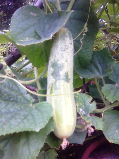 শশা বাংলাদেশের একটি বারোমাসি সবজি